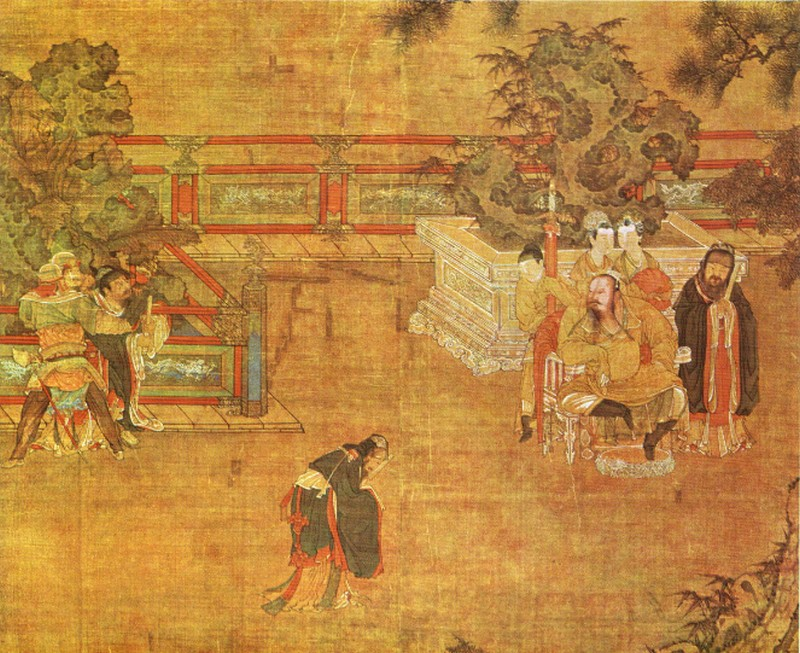 La balustrade brisée. Anonyme vers 1100, suiveur de Zhao Yan, peintre chinois du Xe siècle. Rouleau mural, encre et couleurs sur soie. (173,9x101,8cm). Peinture de même époque, reproduite dans un jardin et un décor architectural identiques à ceux des Huit cavaliers au printemps, et dans un même esprit pictural. Musée national du palais impérial, Taipei.